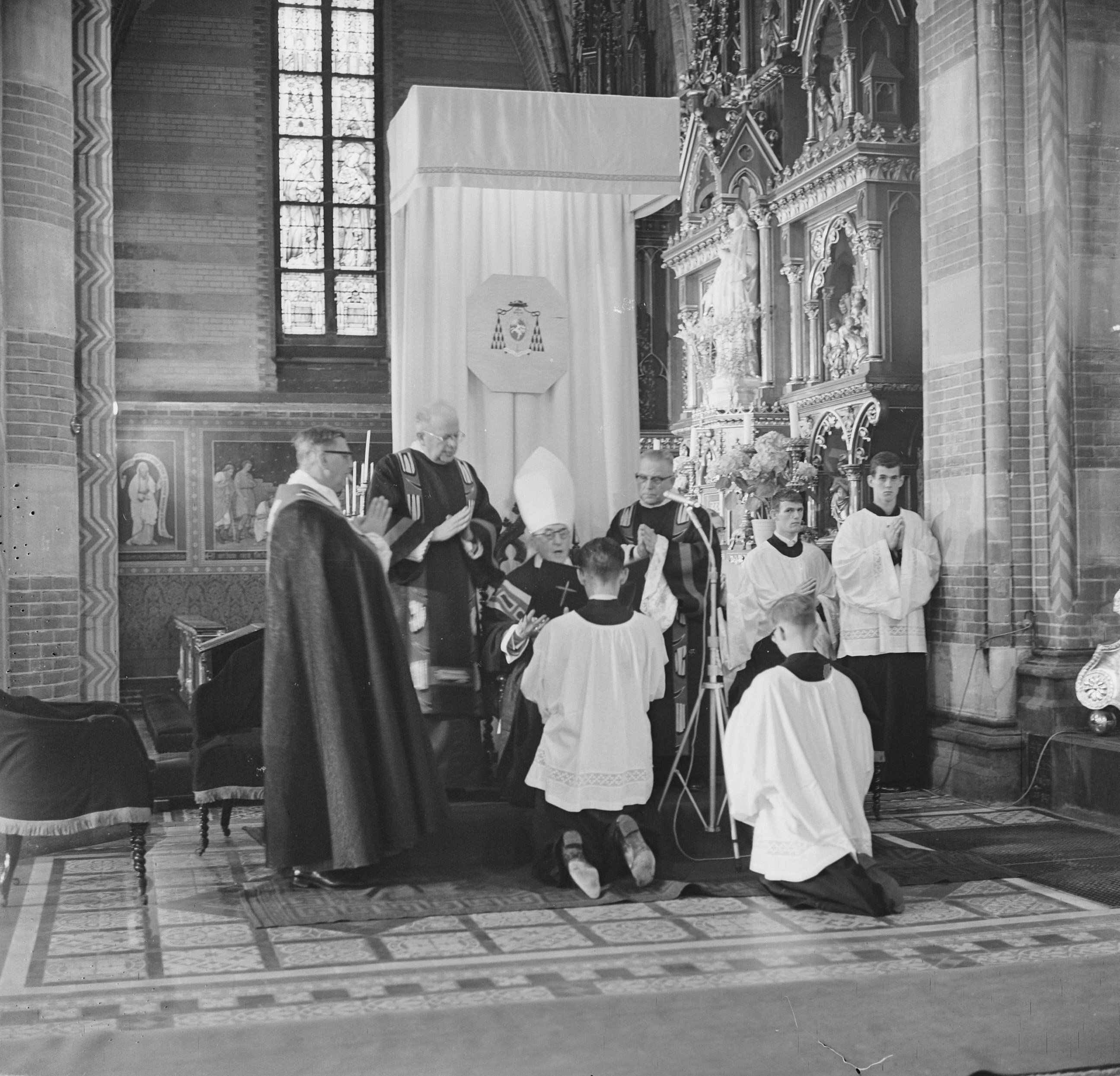 Collectie / Archief : Fotocollectie Anefo Reportage / Serie : [ onbekend ] Beschrijving : Requiemmis voor oveleden Paus in de St. Jacobskerk in Den Haag de Pauselijke Internuntius mgr. G. Beltrami Datum : 11 juni 1963 Locatie : Den Haag, Zuid-Holland Trefwoorden : overleden, pausen Instellingsnaam : Sint-Jacobuskerk Fotograaf : Koch, Eric / Anefo Auteursrechthebbende : Nationaal Archief Materiaalsoort : Negatief (zwart/wit) Nummer archiefinventaris : bekijk toegang 2.24.01.03 Bestanddeelnummer : 915-2531